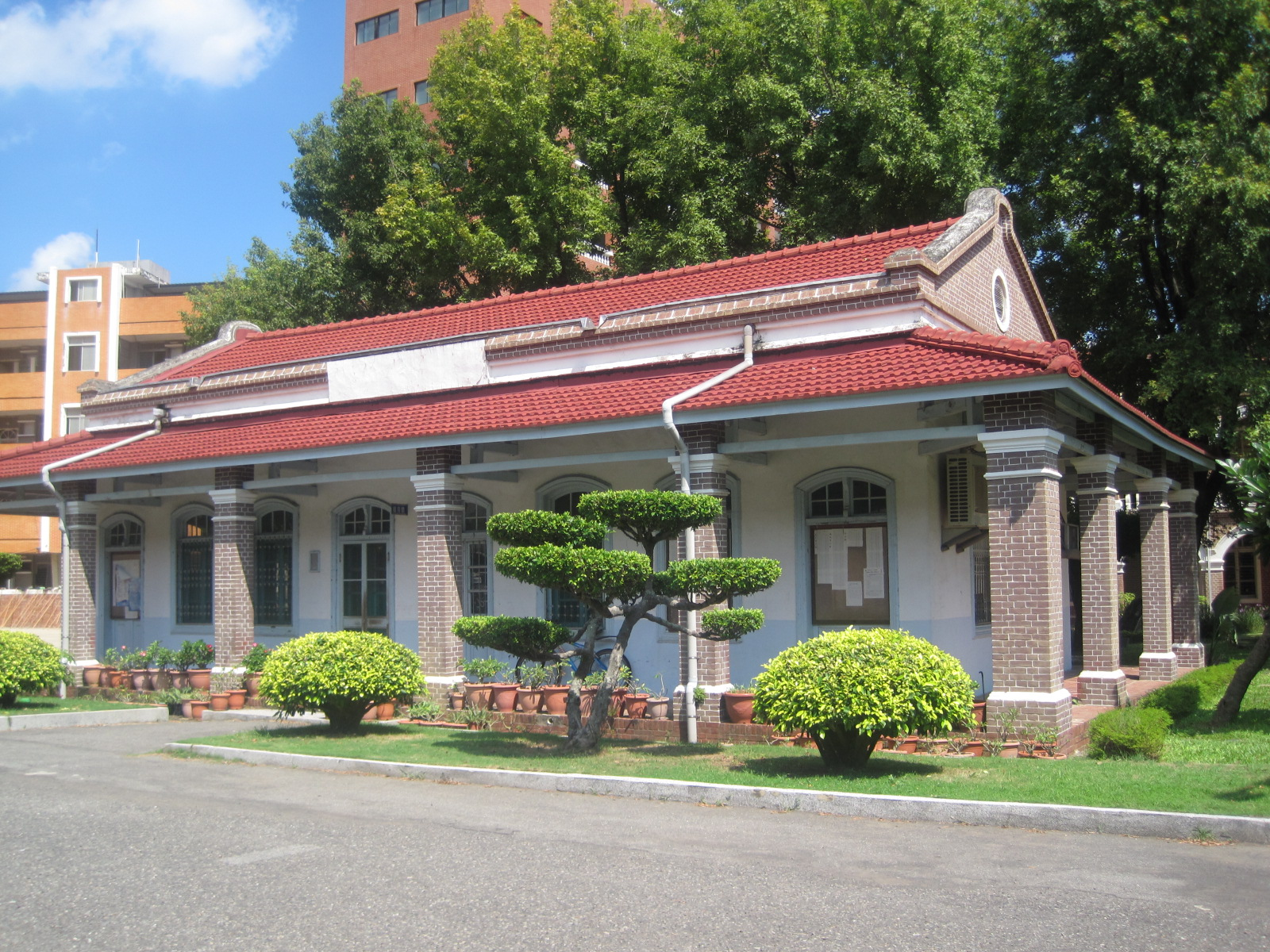 長榮中學體育組